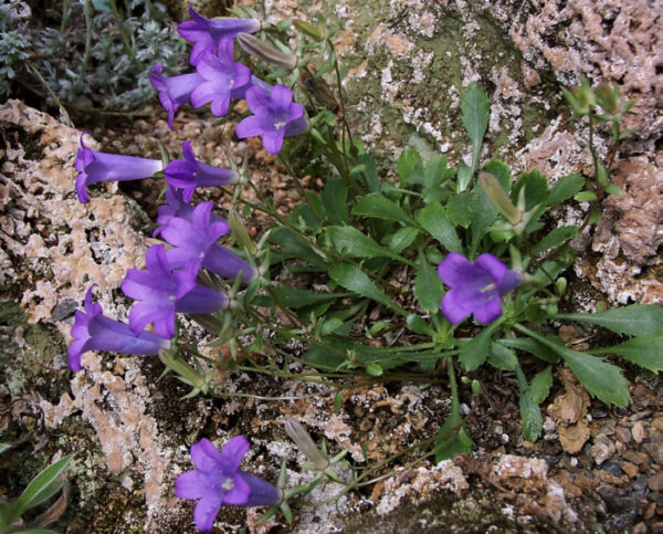 Campanula bornmuelleri – Plante d'une dizaine de centimètres que l'on trouve au sud-est de la Turquie dans des fissures rocheuses entre 2300 et 3500 m